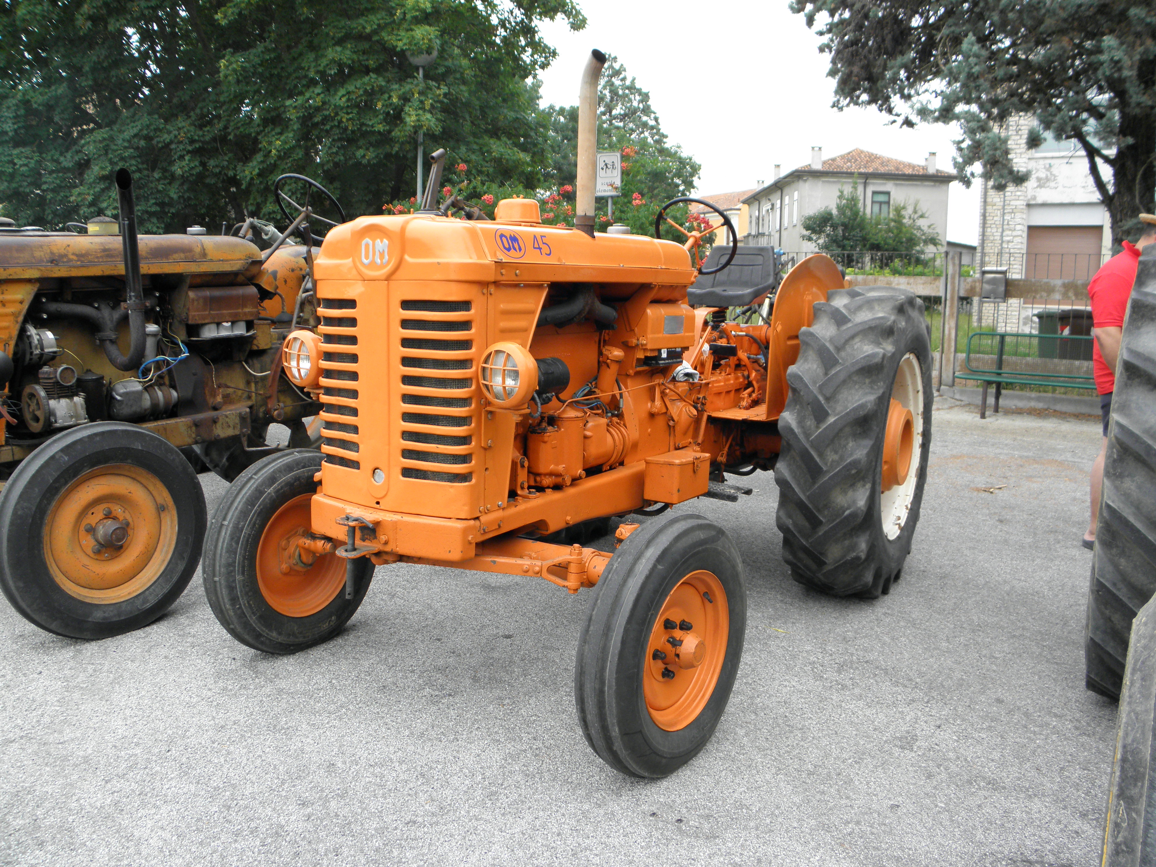 Concadirame, frazione di Rovigo: OM 45 al raduno di trattori agricoli d'epoca ed aratura d'epoca, 29 giugno 2014.